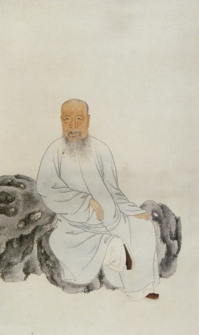 王原祁（1642年－1715年），字茂京，号麓台，一号石师道人，江苏太仓人。清代画家，“四王”之一。